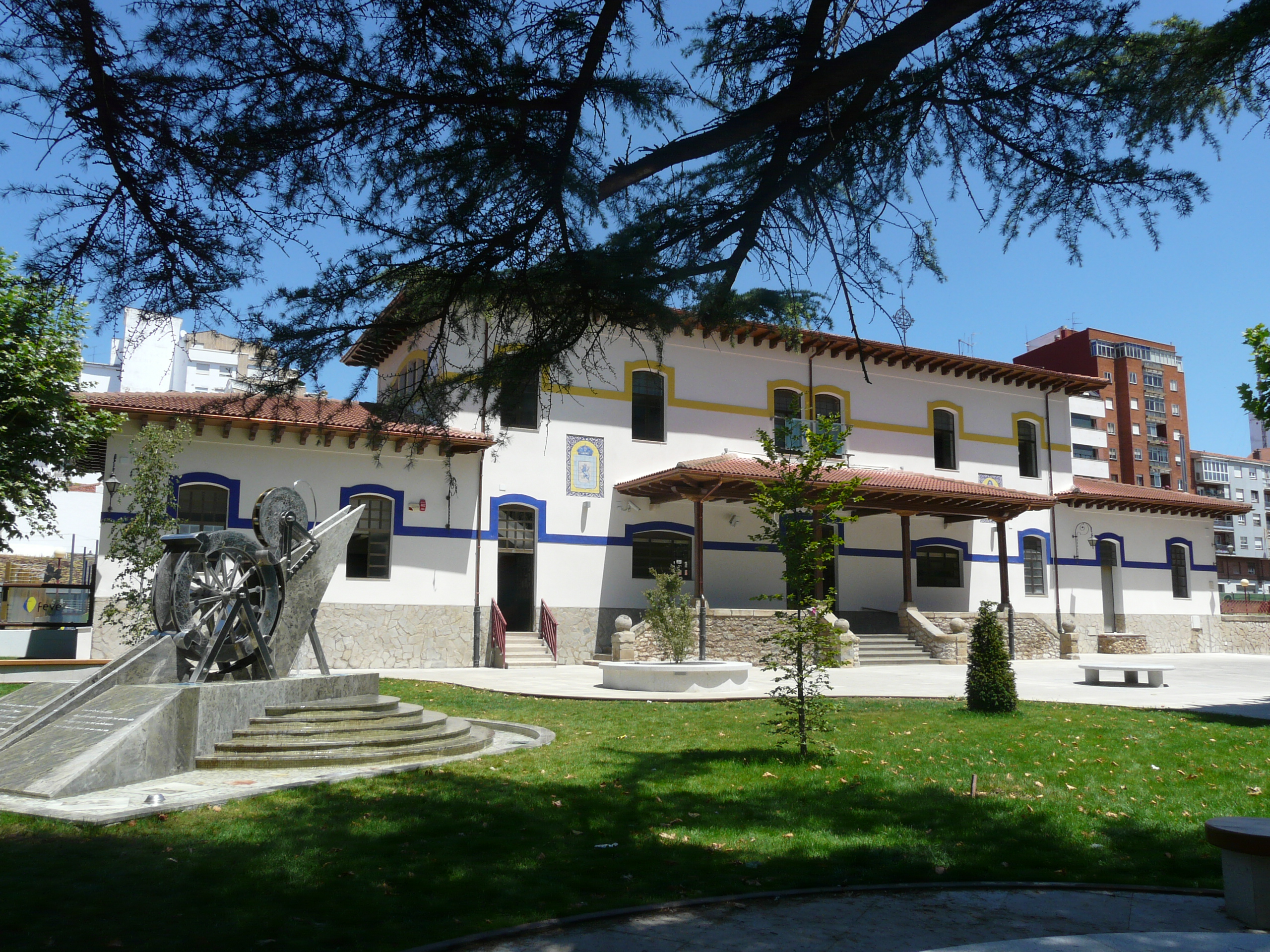 Estación de Feve